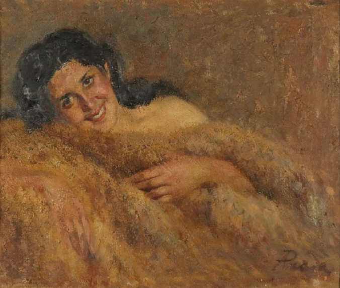 Ritratto femminile, olio su tela, 60 x 75 cm., firmato, coll. privata